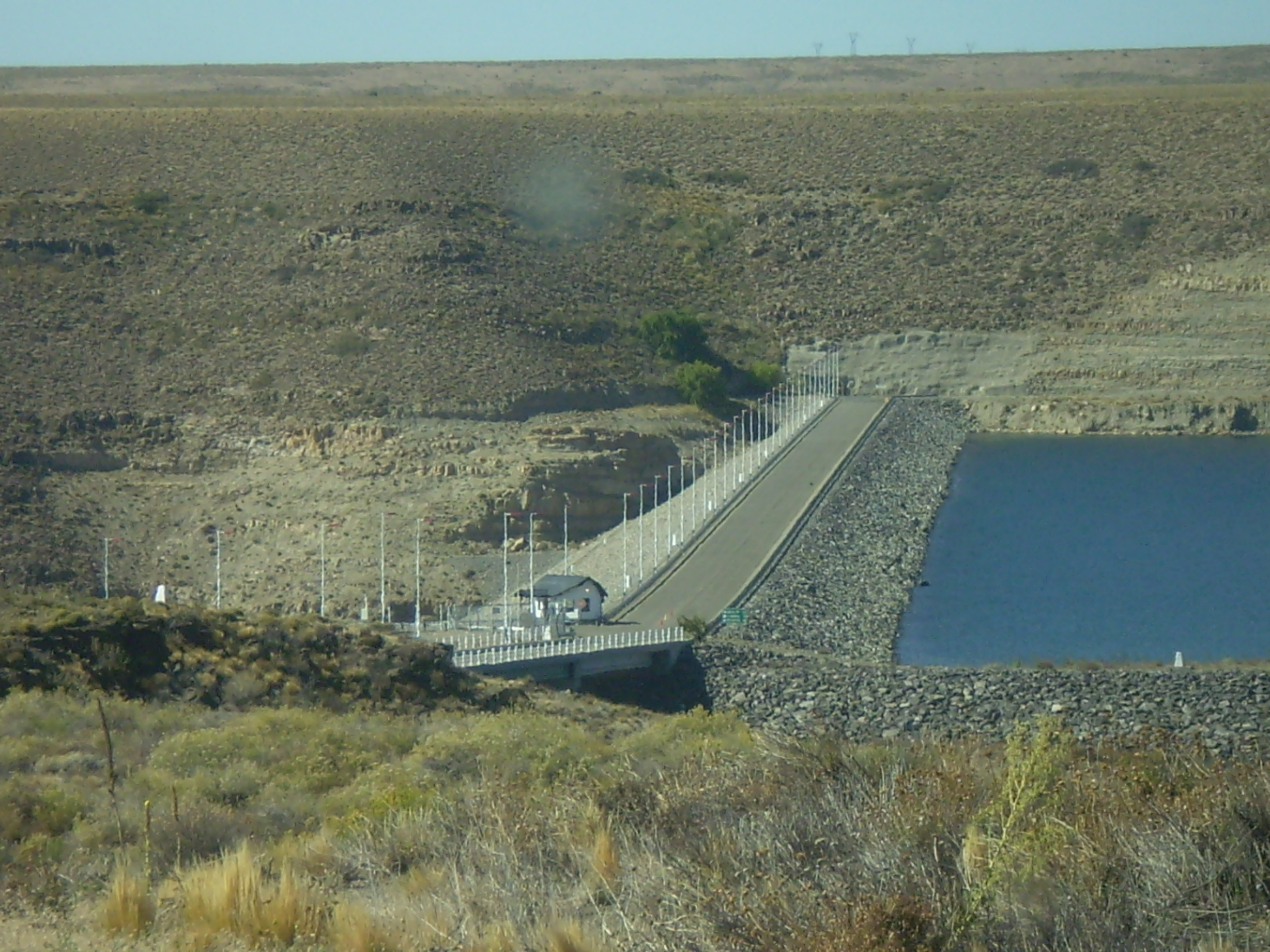 Represa de Alicurá, sobre el río Limay, Argentina